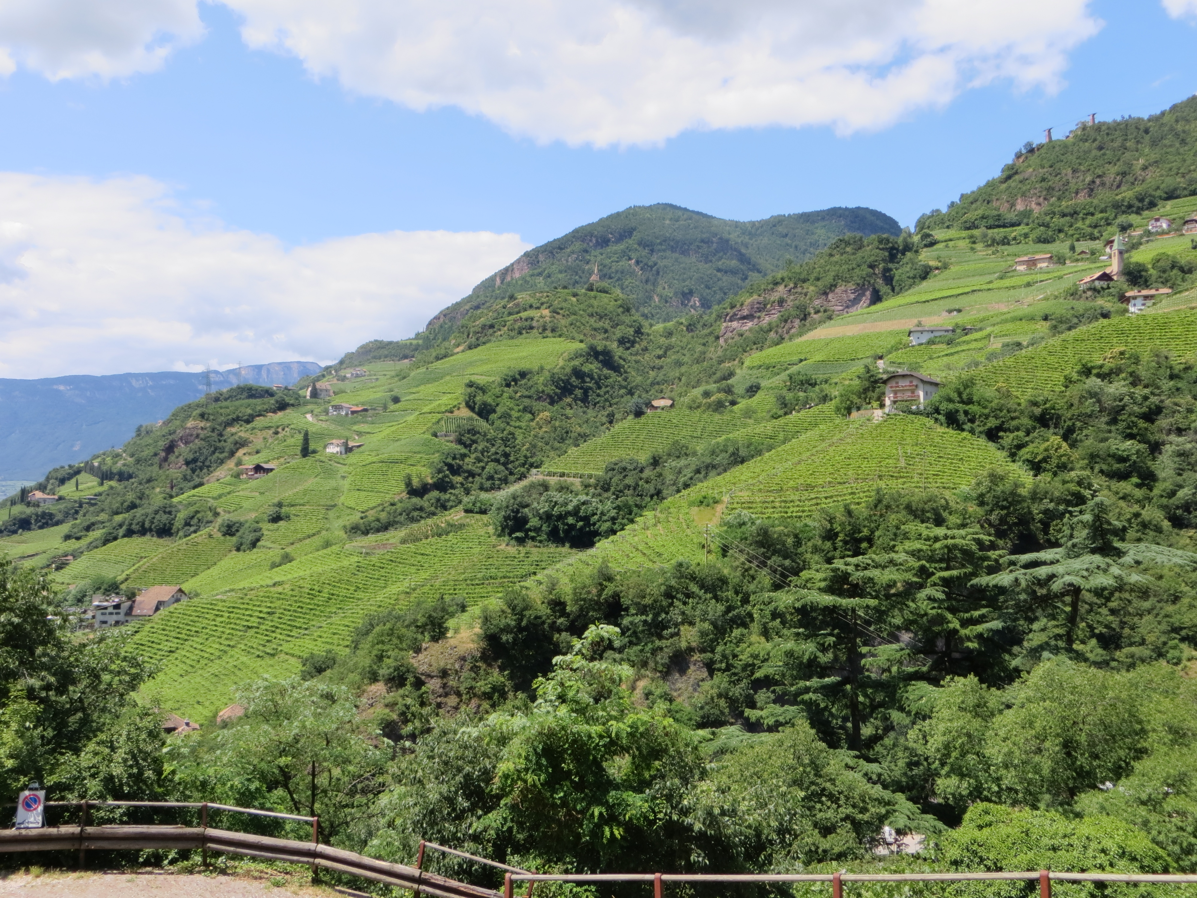 Bolzano